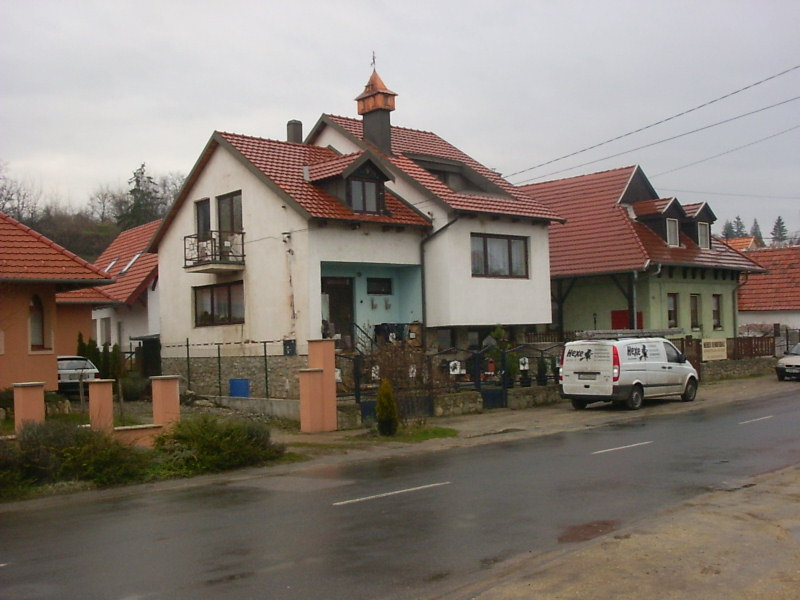 Érdekes kéménydíszítmény (Balf, Sopron)